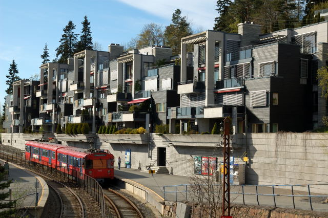 T1300-tog på Holmenkollen stasjon